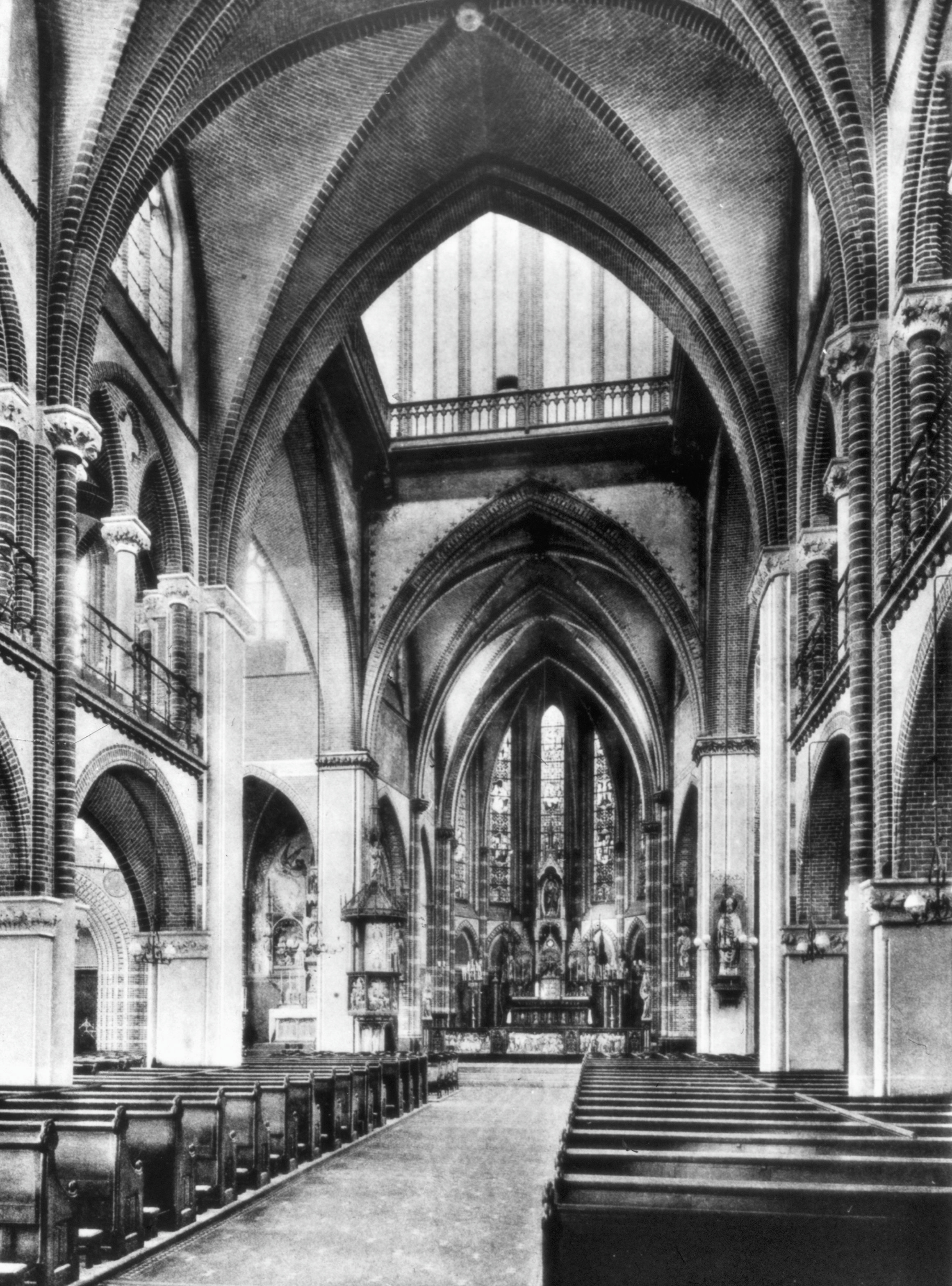 Augustinuskerk: Interieur, overzicht naar het oosten van de in de oorlog vernielde en later gesloopte kerk